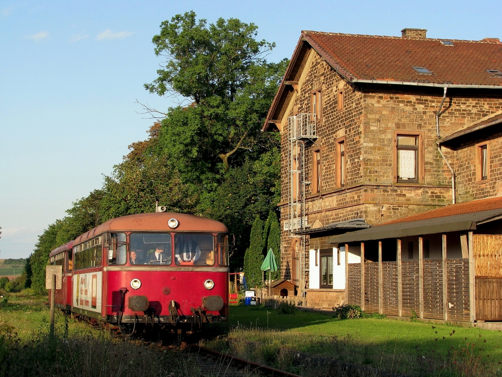 798 818 der Pfalzbahn befindet sich am 18.9.08 zusammen mit dem Steuerwagen 996 677 auf dem Weg von Monsheim nach Kaiserslautern Hbf, hier beim Halt in Göllheim-Dreisen